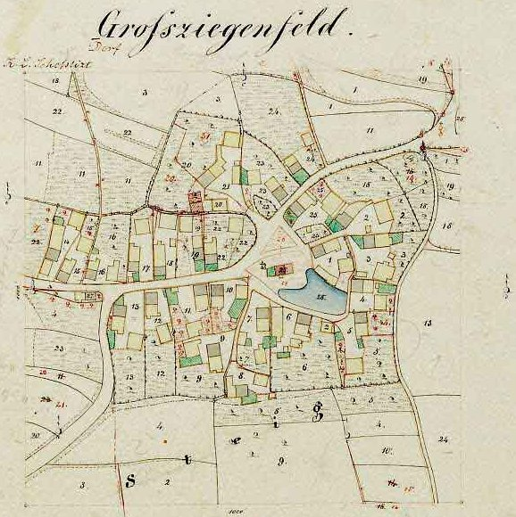 Historische Karte von Großziegenfeld